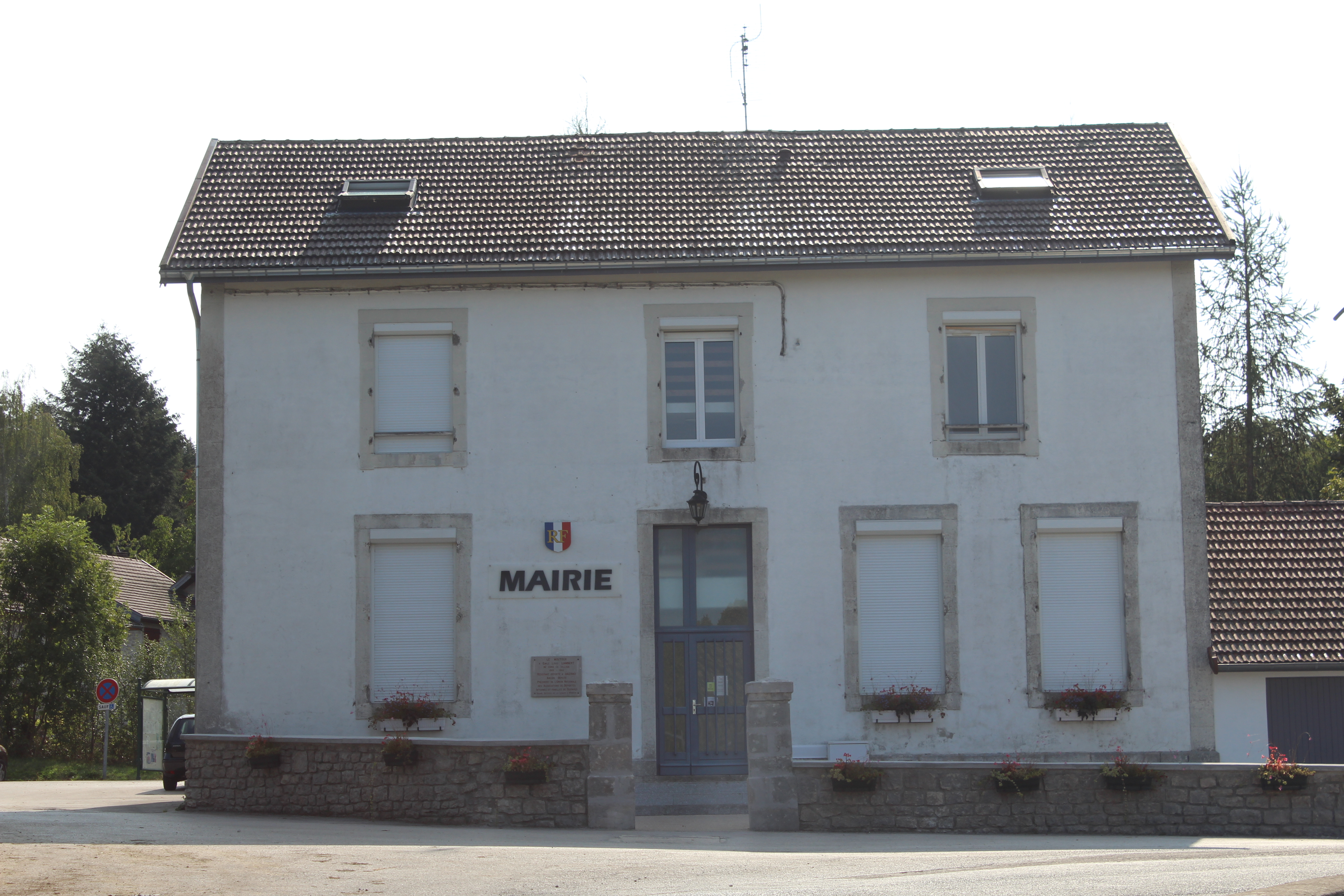 Mairie de Moutoux.